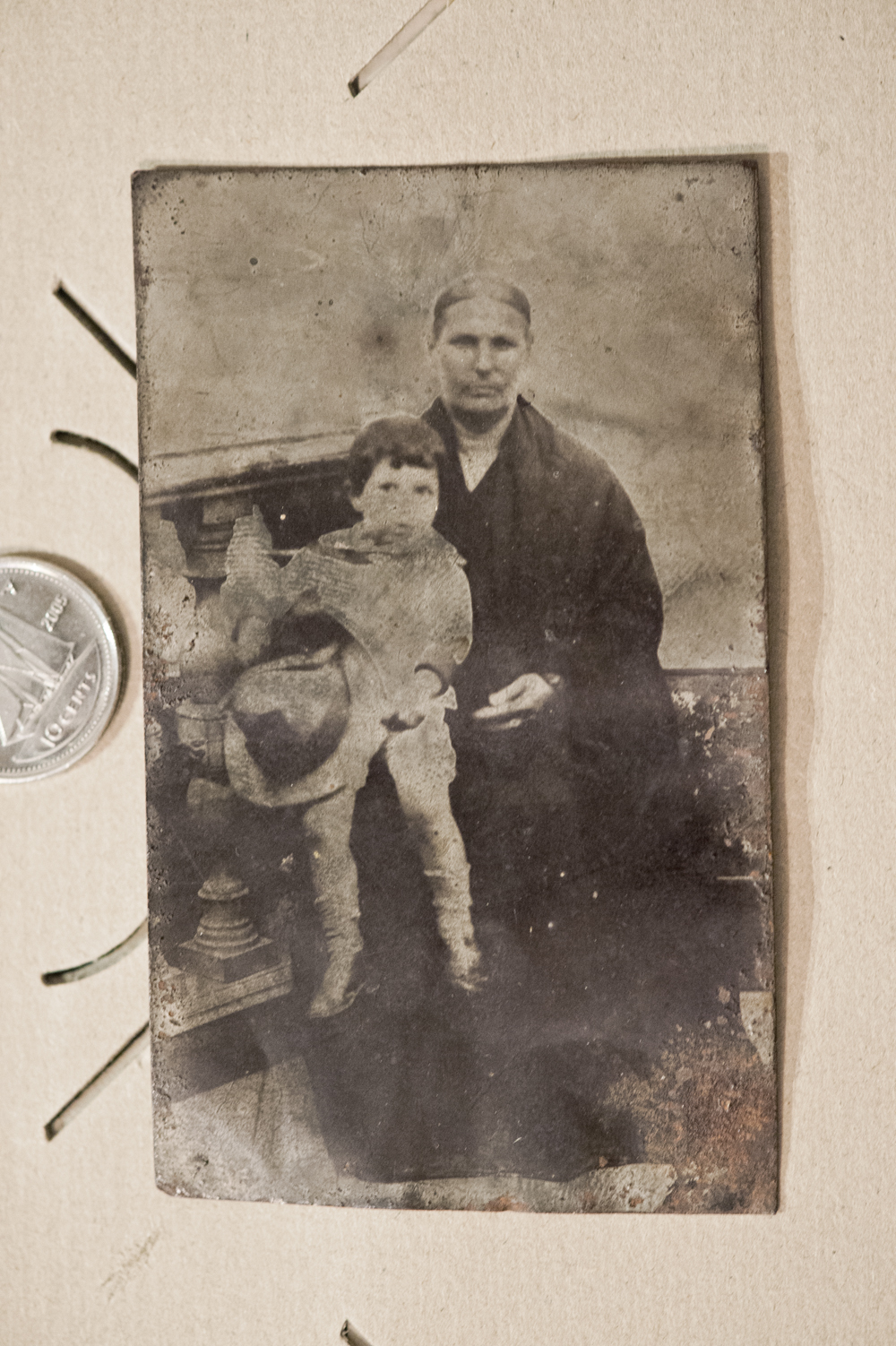 Daguerrotipo de 1888. Muestra a Marina Salado Ariza y Manuel Virues Salado, de Chiclana de la Frontera. España.